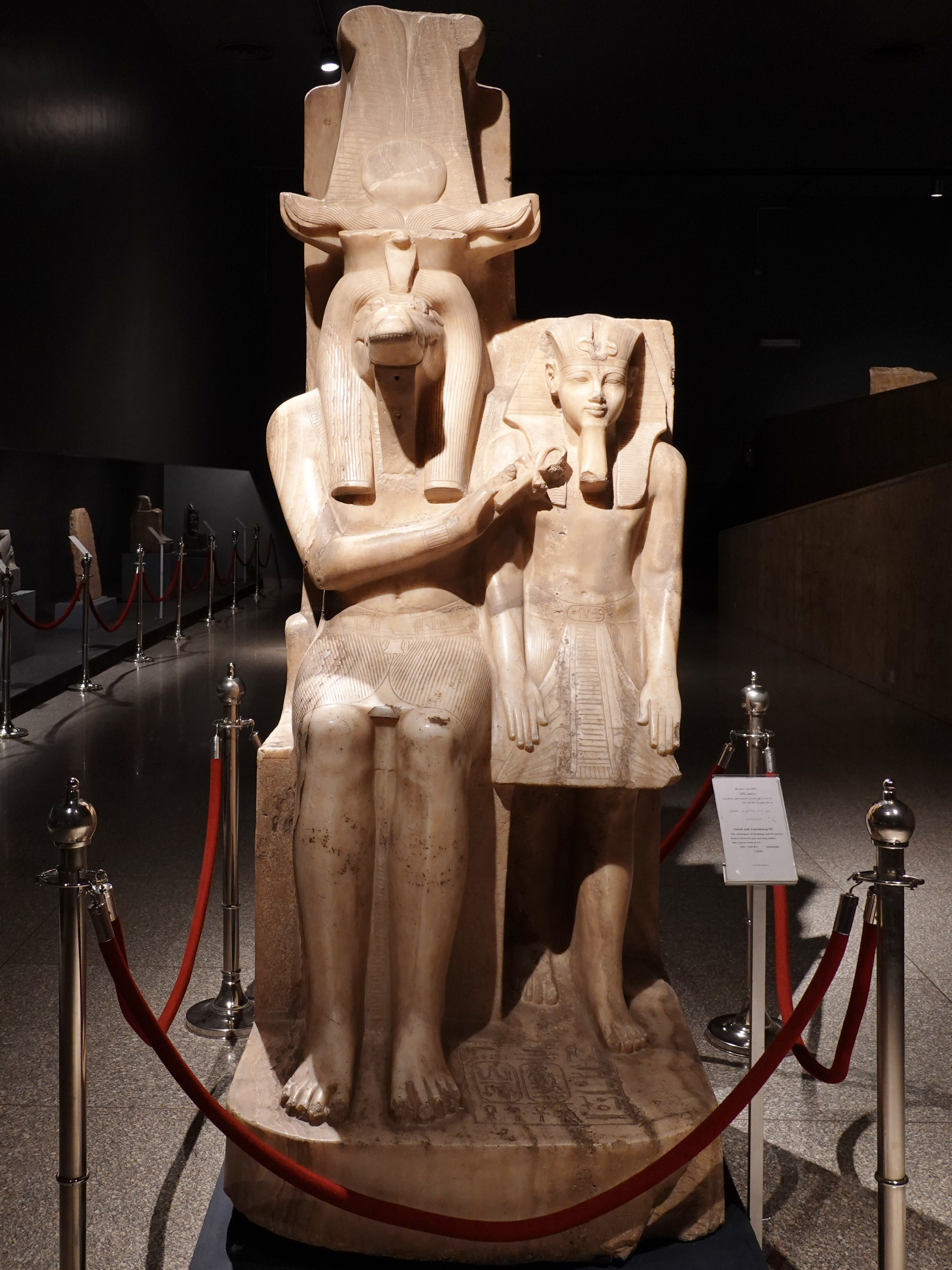 Statuen des Königs Amenophis III. neben dem Gott Sobek (Höhe: 256,5 cm, Alabaster, 18. Dynastie), gefunden in Dahamscha, Armant, ausgestellt im Luxor-Museum, Ägypten